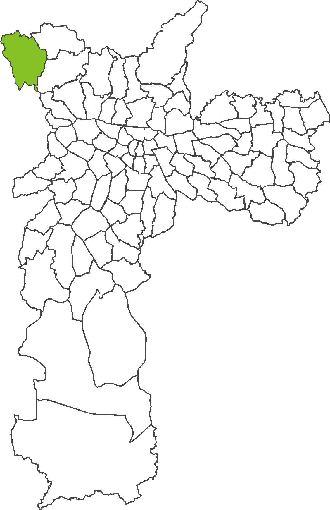 Localização do distrito de Anhangüera no município de São Paulo.